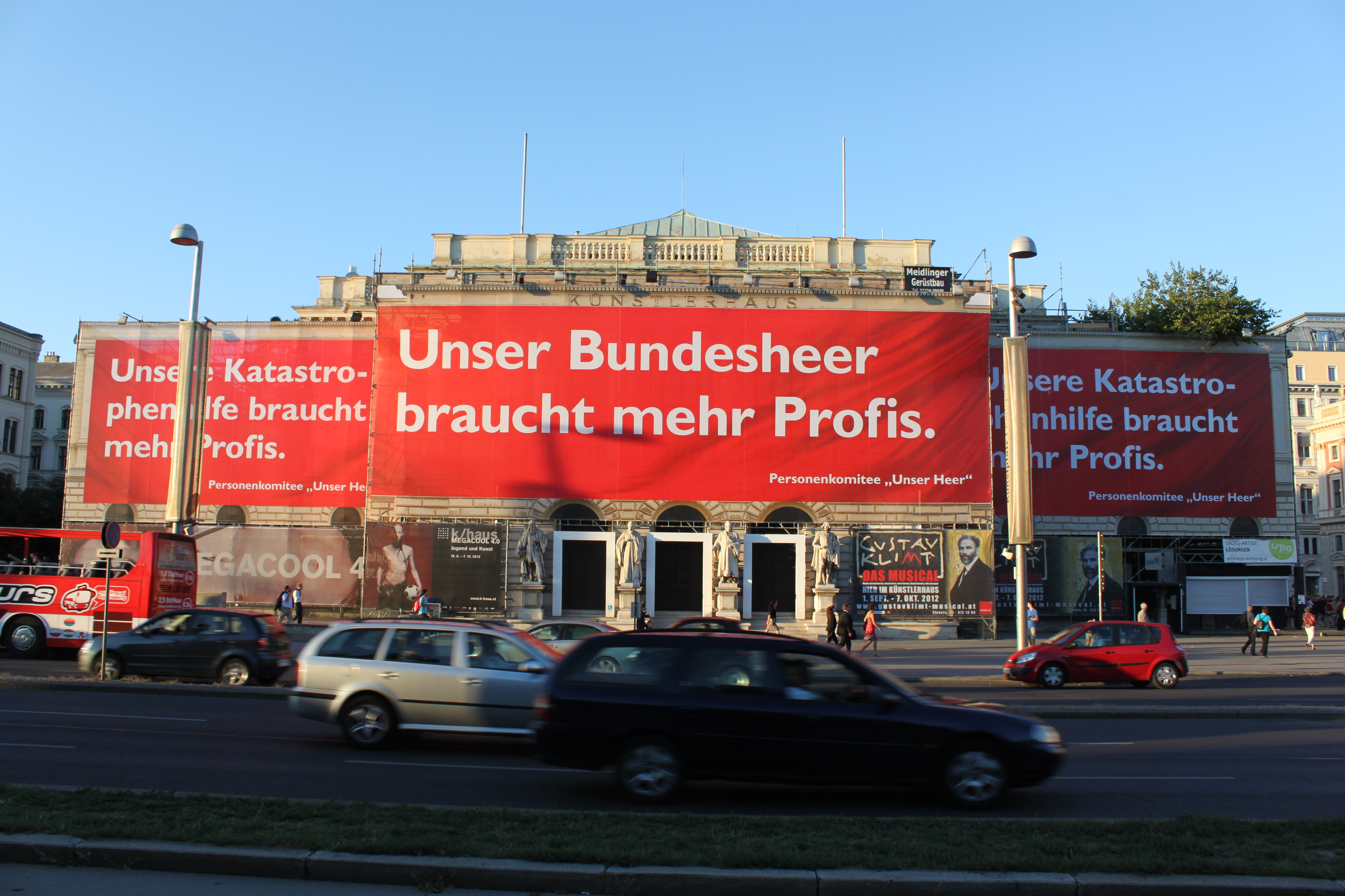 Künstlerhaus, kurzzeitige Plakatierung am Baugerüst des Künstlerhauses in Wien zur kommenden Volksbefragung in Österreich am 20. 01. 2013 zur Wehrpflicht einerseits oder Berufsheer andererseits